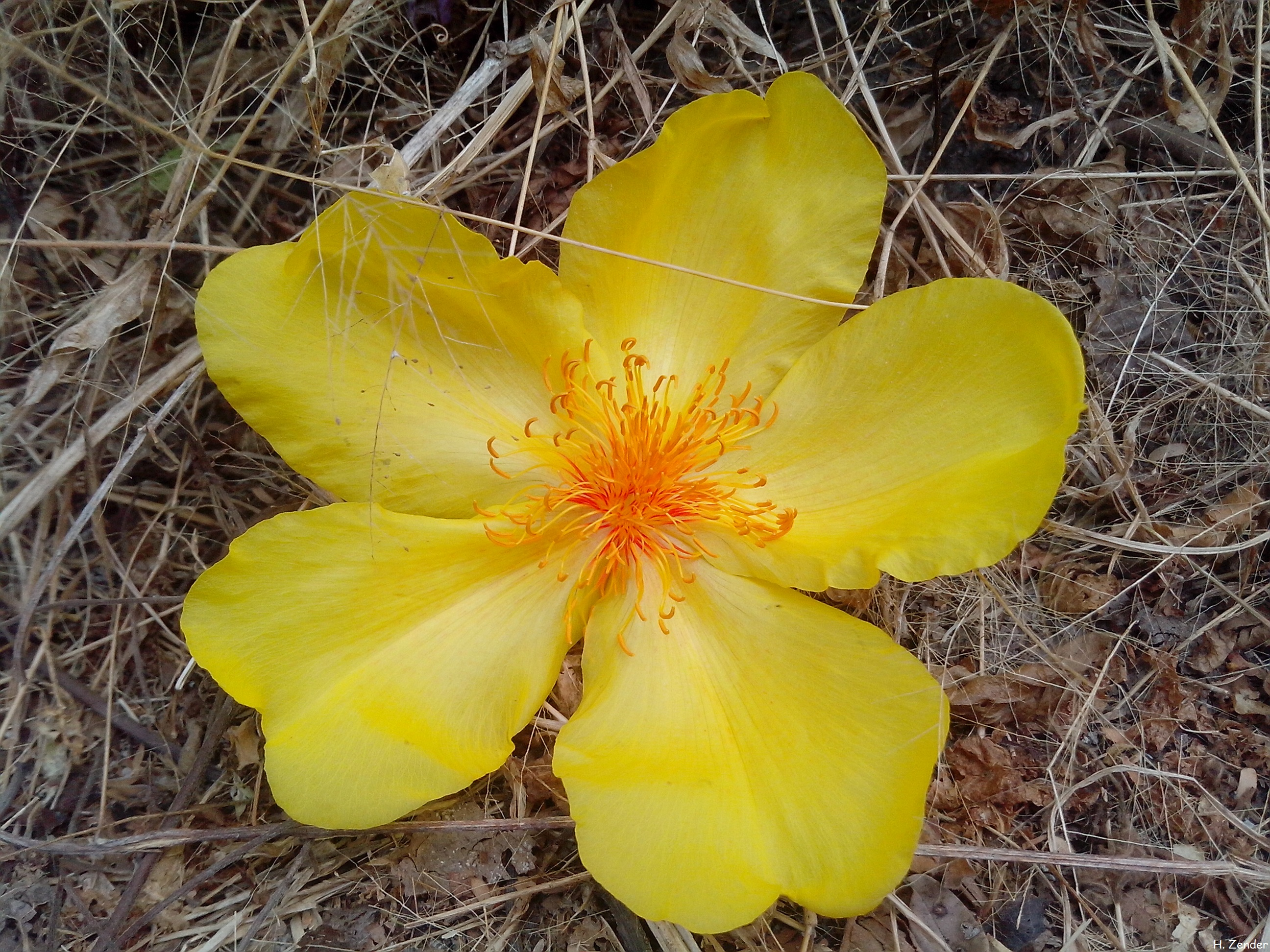 Detalles de flor; Cochlospermum vitifolium, Foto: Bosque Seco Ecuatorial Tumbesino